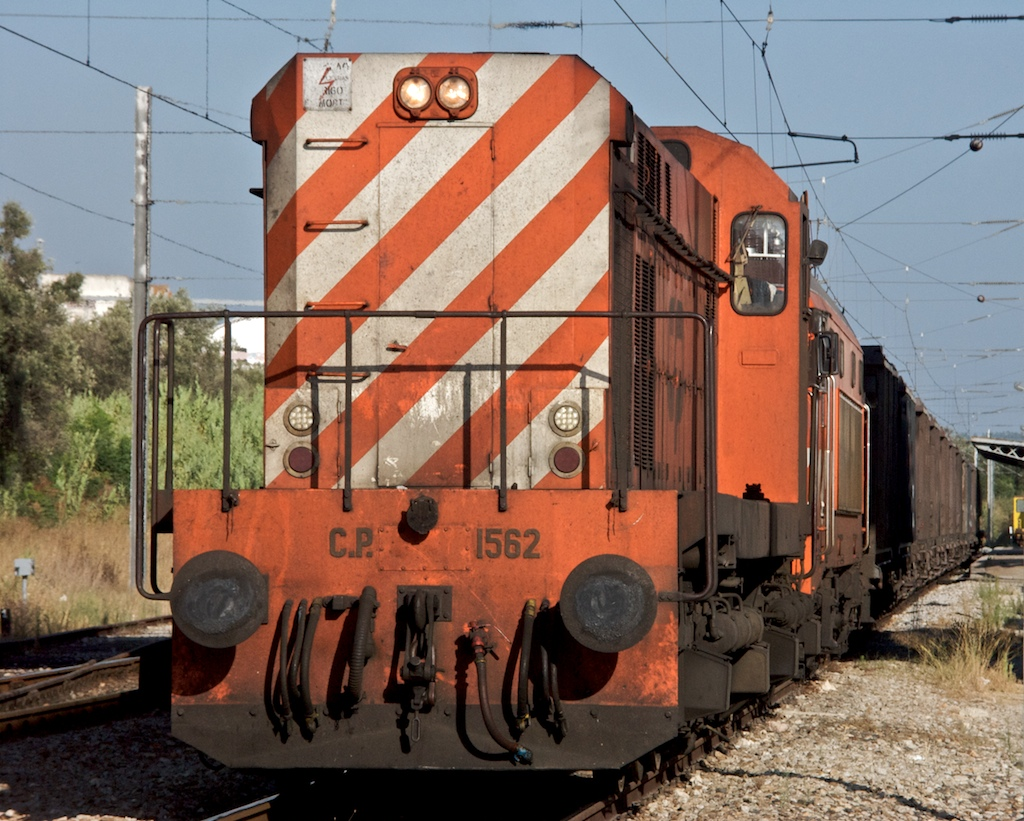 Tipo: Comboio de Transporte de Areia 62992 (material vazio) [Loulé - Poceirão] Local: Estação de Alcácer do Sal [Linha do Sul, PK 78] Data e hora: 21 de Julho de 2008 [18h50] Material: Locomotivas 1562 e 2627 + 13 vagões (11 CP Falls + 1 Transfesa Faoos + 1 CP Rlps) som desta foto aqui e aqui.